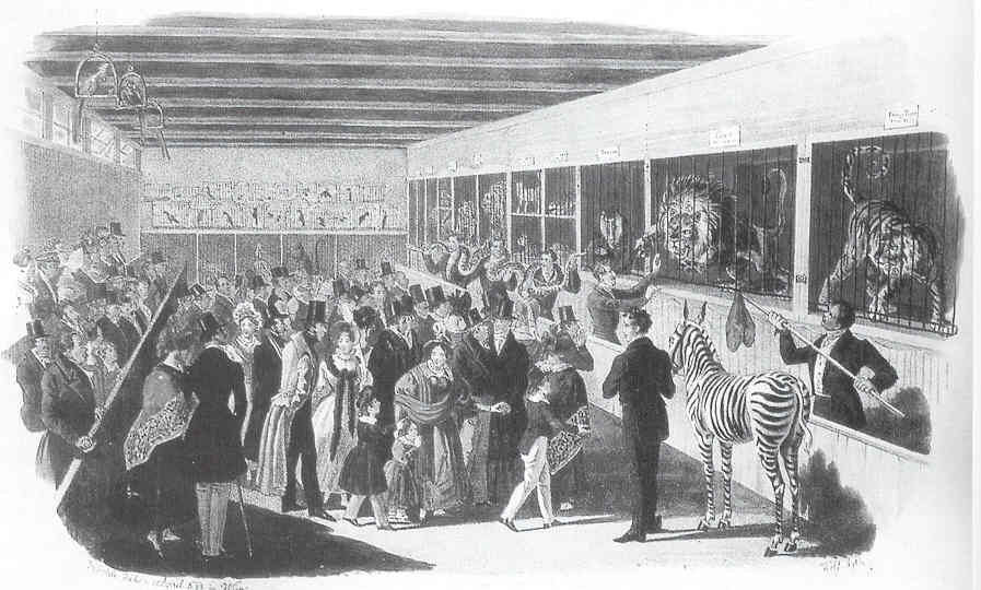 Menagerie Hermann van Aken. Lithographie, 1833. Privatbesitz